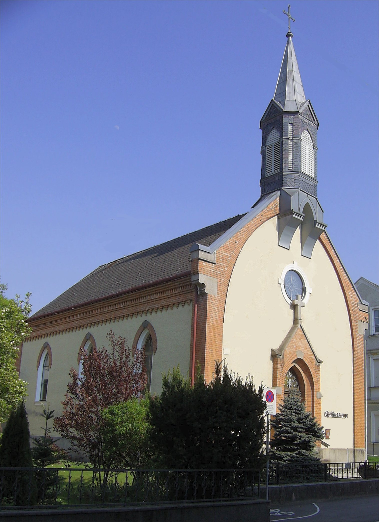 Altkatholische Christuskirche selbst fotografiert